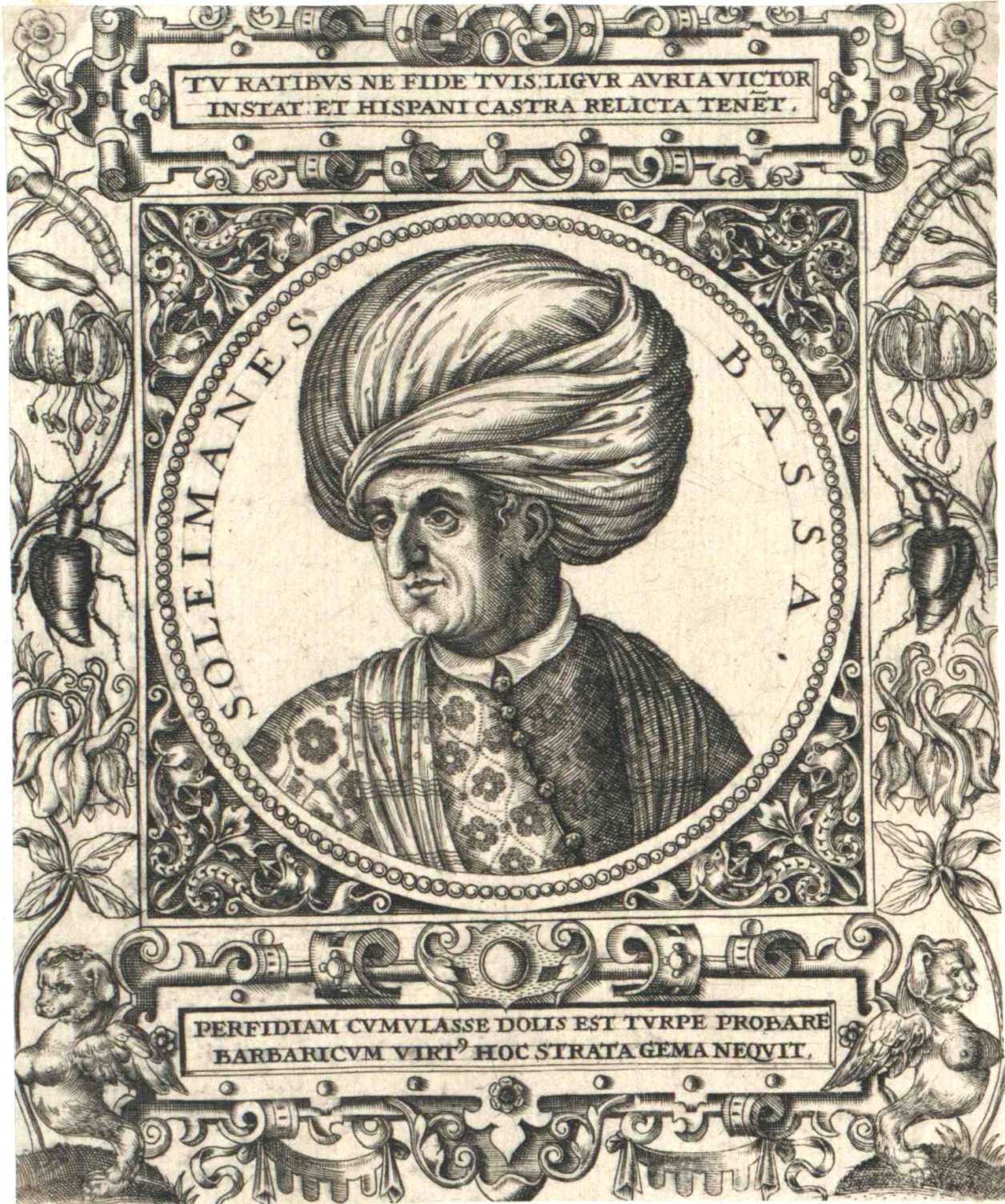 Grafik aus dem Klebeband Nr. 1 der Fürstlich Waldeckschen Hofbibliothek Arolsen Illustration aus: Georg Greblinger: Wahre Abbildungen der Türckischen Kayser vnd Persischen Fürsten / so wol auch anderer Helden und Heldinnen von dem Osman / biß auf den andern Mahomet. Johann Ammon, Frankfurt 1648 Motiv: "Soleimanes Bassa" (Süleyman Pasha, wohl Hadım Suleiman Pasha († 1547))